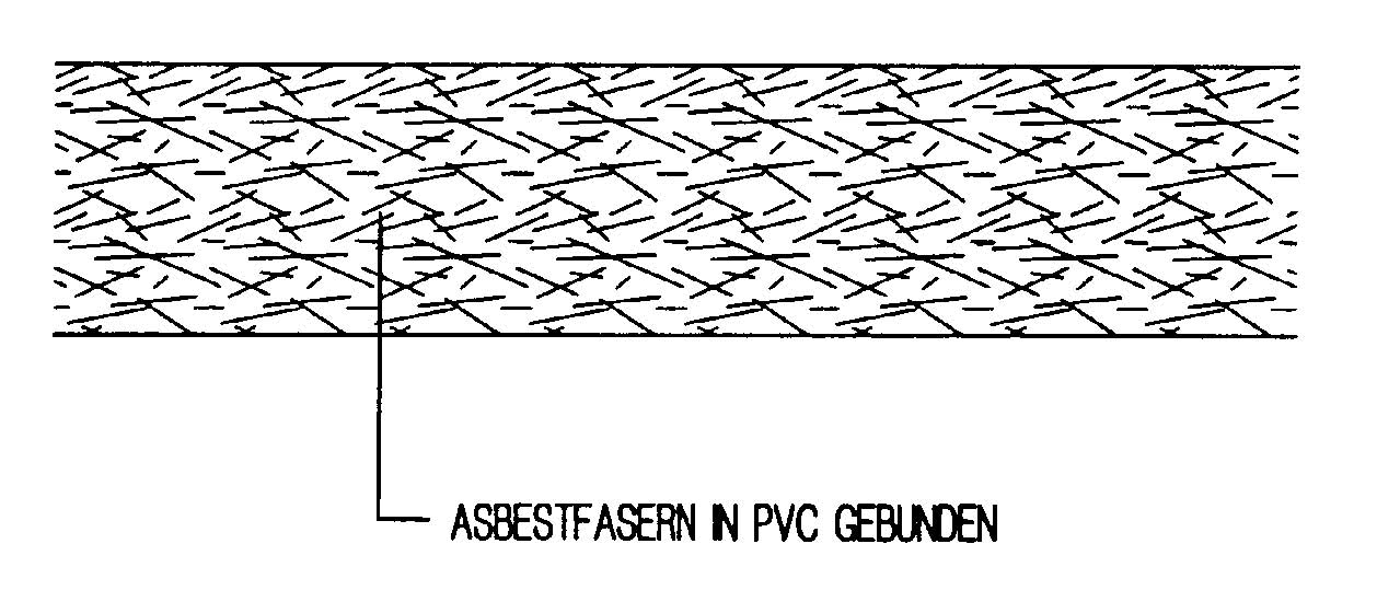 Schnitt einer „Flex“-Platte